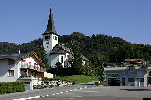 Dorfeinfahrt von Illgau (Muotatal)